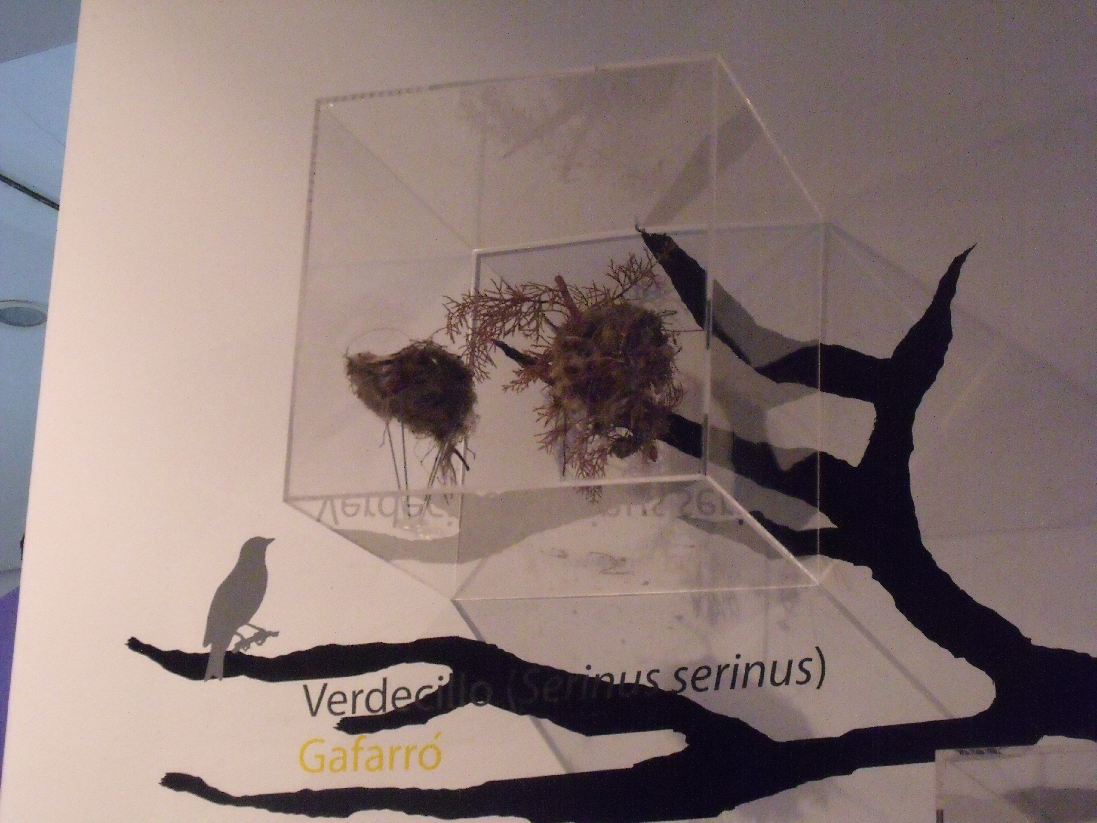 Nido de Serinus serinus